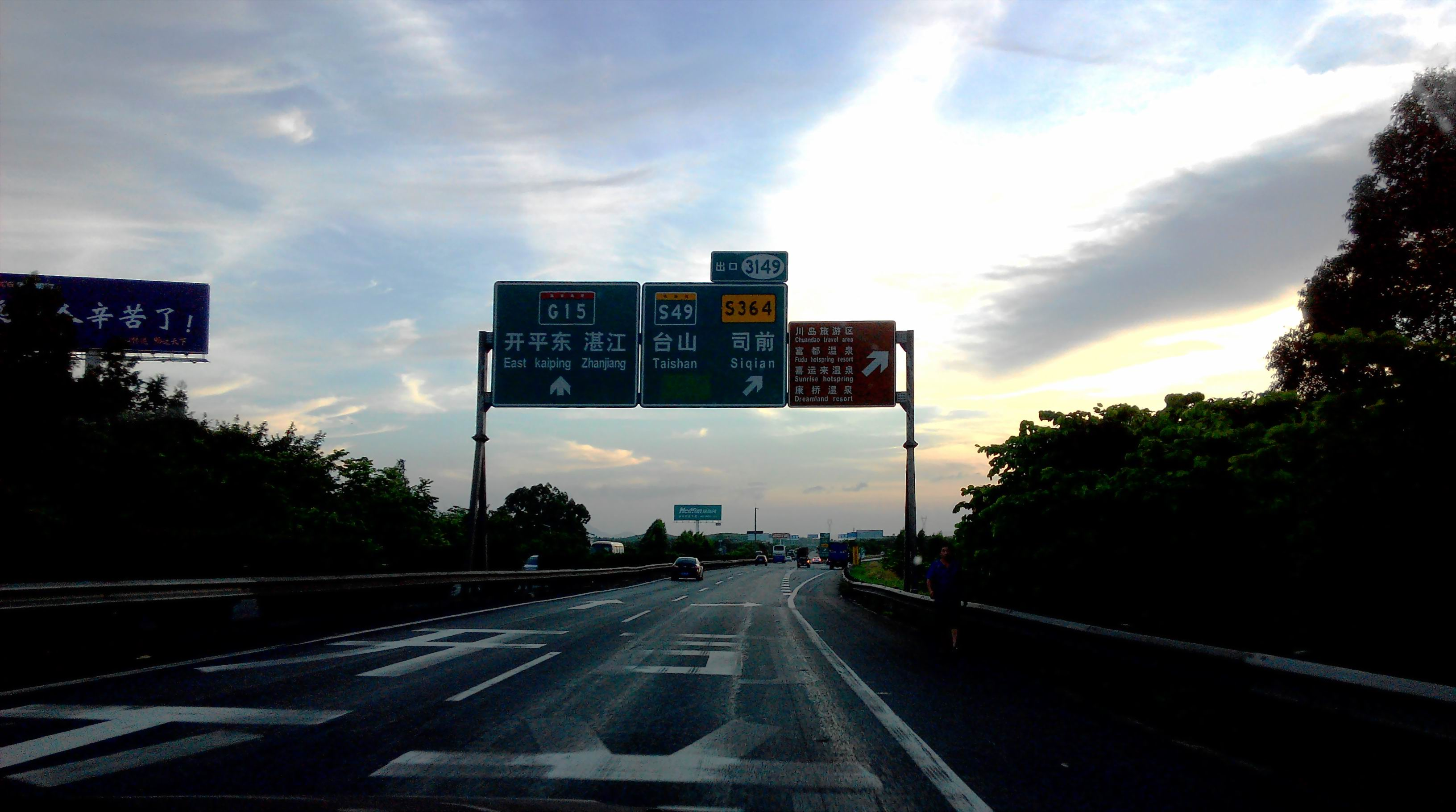 中国高速G15 江门市开平段 海口方向 3149出口